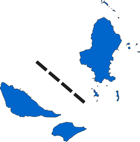 Résultats des élections législatives de Wallis-et-Futuna en 2012